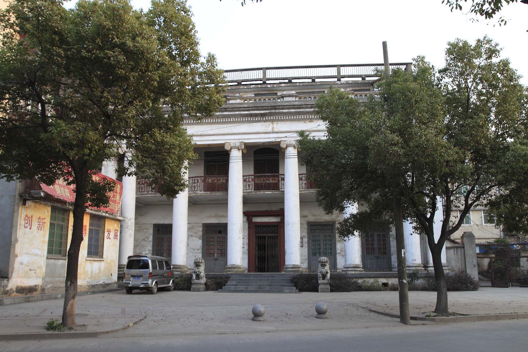 江西省九江市美孚洋行旧址，全国重点文物保护单位